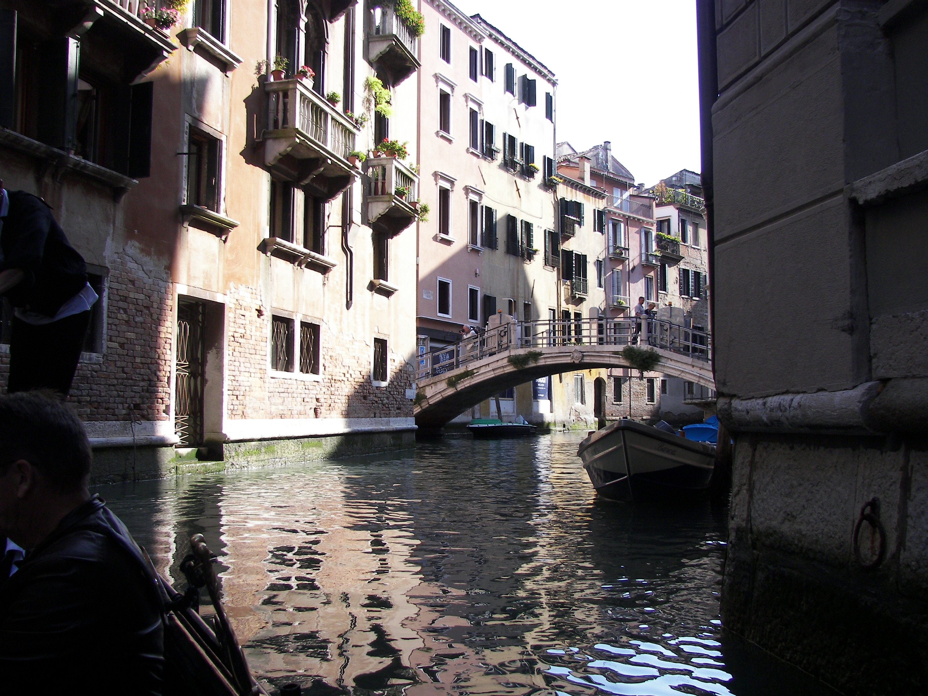 Ponte Goldoni from Rio dei Scoacamini in Venezia.